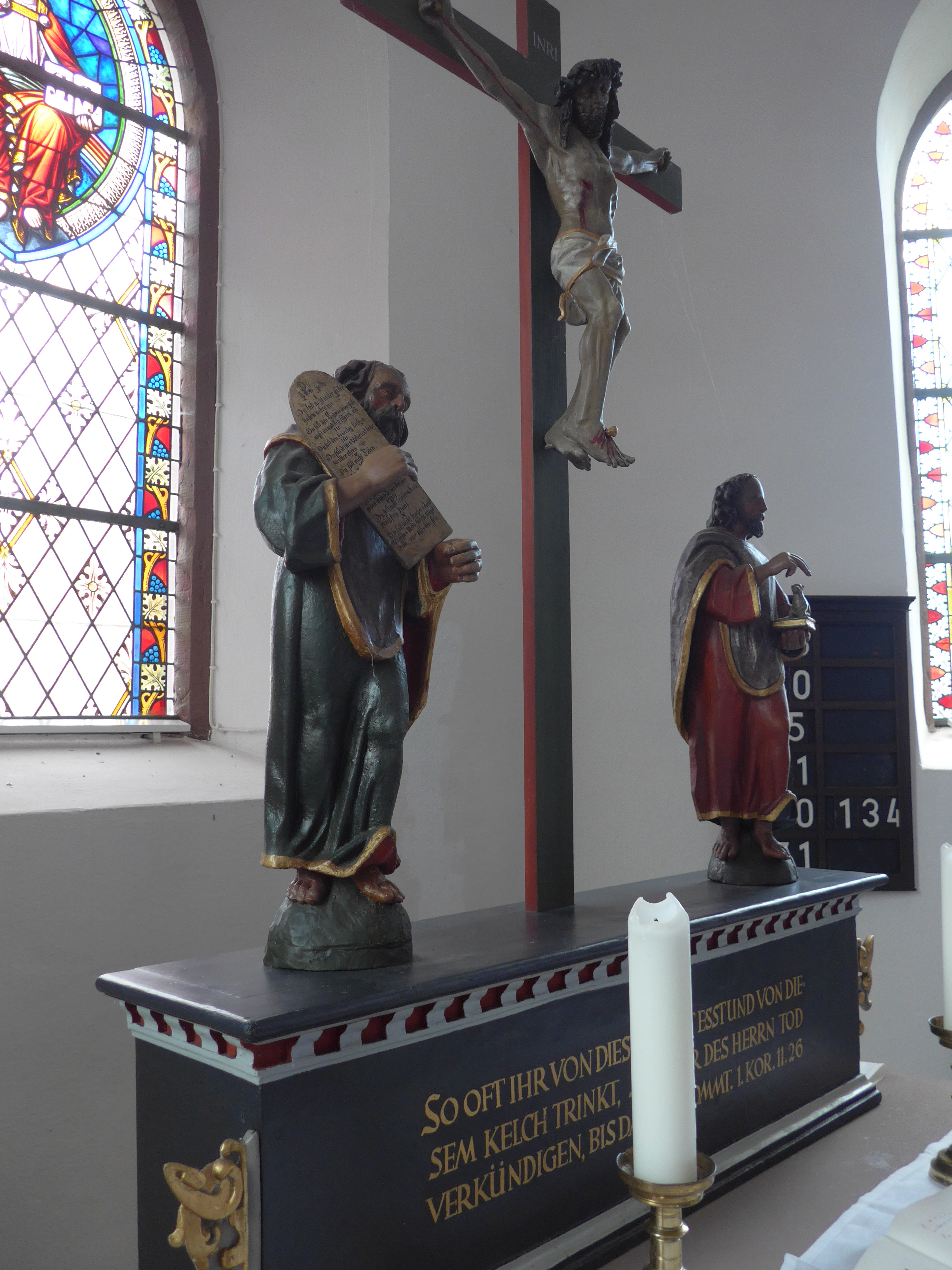 Skulpturen um 1650 in der Kirche St. Jakobus in Eboldshausen